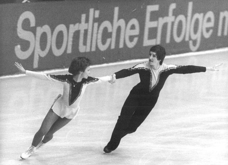 Manuela Mager, Uwe Bewersdorf ADN-ZB Thieme 14.12.1979 Karl-Marx-Stadt: DDR-Meisterschaften im Eiskunstlauf.-Fast ebenso hoch wie die favorisierten Baeß-Thierbach wurden die Dresdner Manuela Mager - Uwe Bewersdof (Foto) bei ihrer Kurzkür bewertet. Ihr Programm bestach vor allem durch Harmonie, obwohl die Meisterschaft für die beiden der erste Wettkampf nach zweijähriger Pause ist. Mit der Platzziffer 15 und 31,64 Punkten liegen sie vor der abschließenden Kür auf dem 2. Platz.